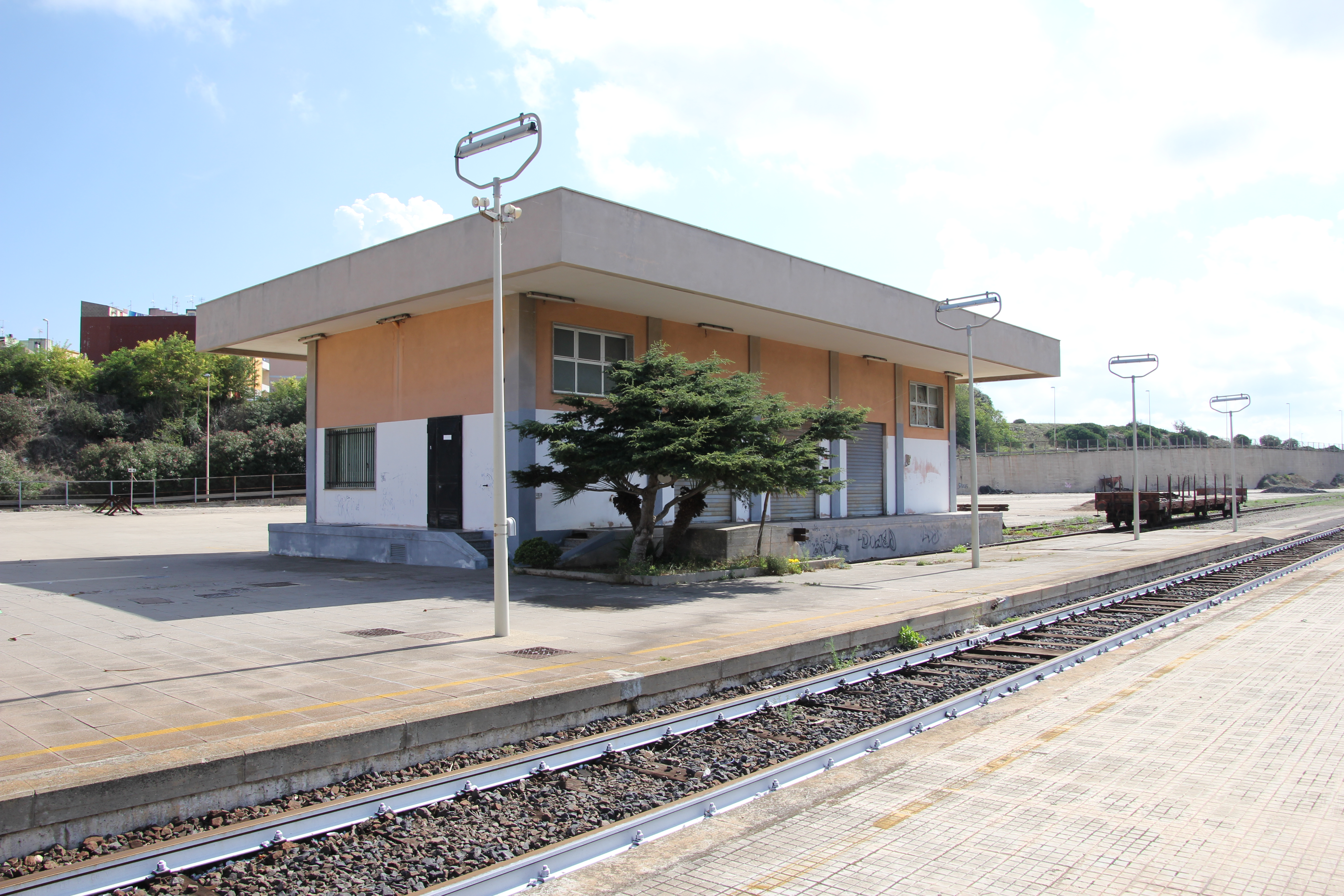 Porto Torres, stazione ferroviaria